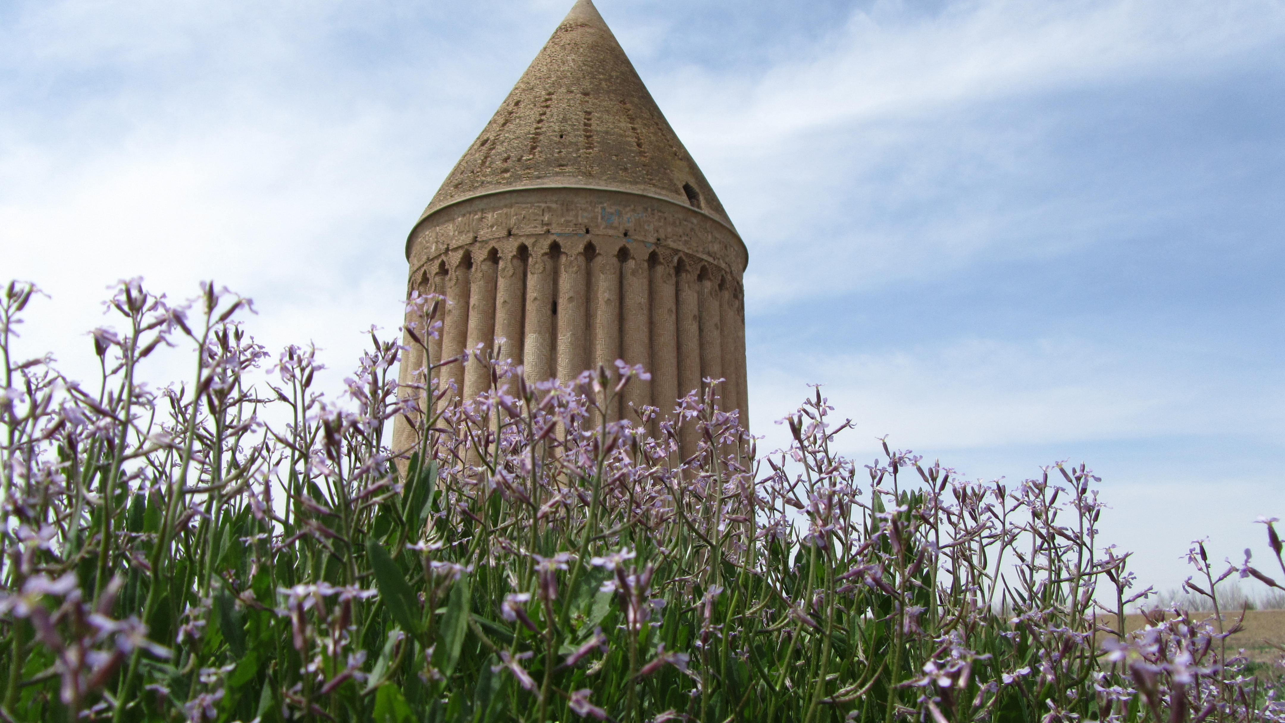 برج مقبره رادکان